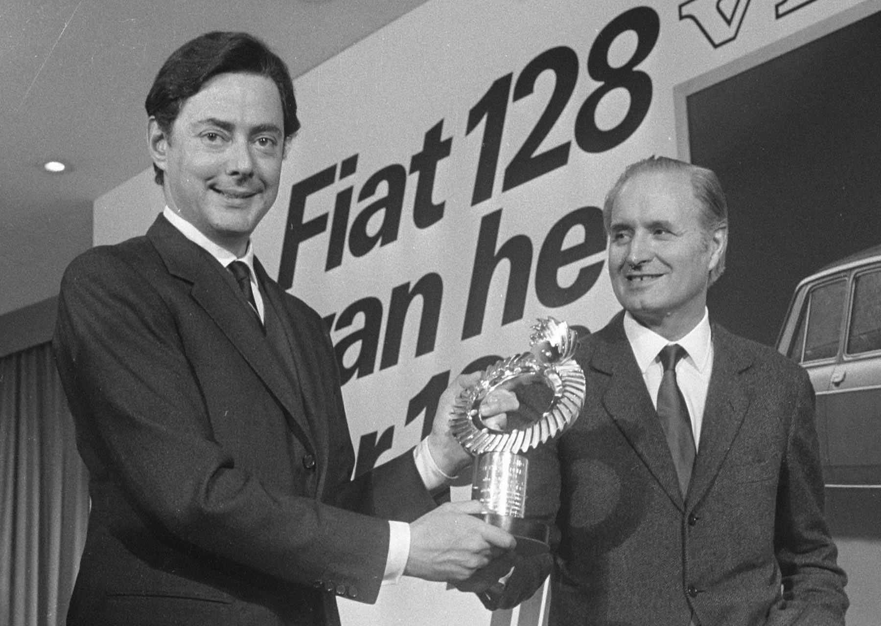 Fiat 128 auto van het jaar. Links dr. Numberto Agnelli en dr. Giacosa, ontwerper 128, ontvangen de trophee in Hilton Amsterdam.